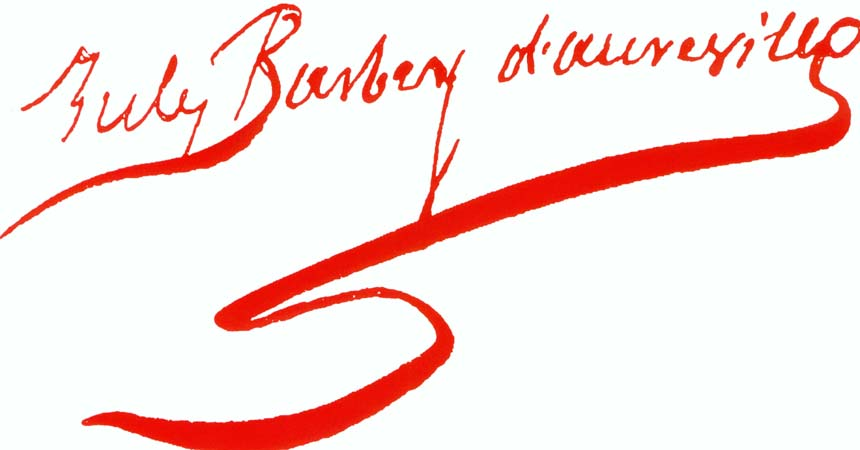 Signature autographe de Jules Barbey d'Aurevilly (1808-1889)